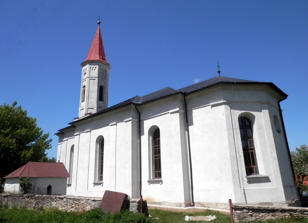 Obec Šambron, okres Stará Ľubovňa.